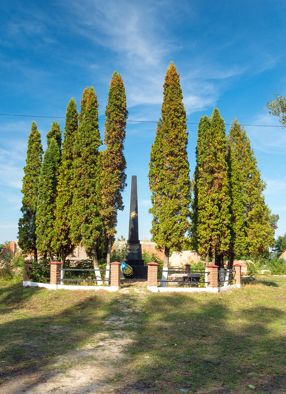 Пам'ятник воїнам — односельчанам, загиблим у роки ВВВ, Житомирський район, с. Гадзинка , Глибочицька с/р, біля школи